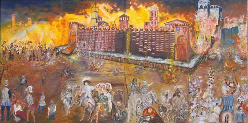 dipinto